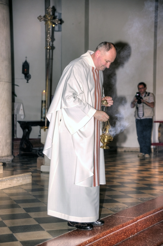 Obred svete potvrde u Kapucinskoj crkvi Gospe Lurdske u Rijeci